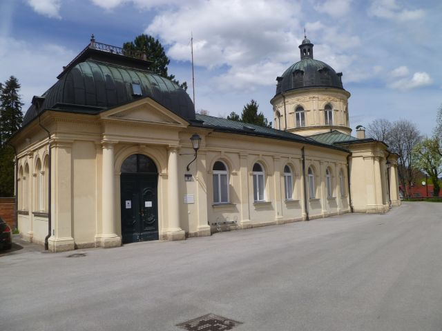 Kommunalfriedhof Salzburg: Gebäude der Friedhofsverwaltung, Salzburg Morzg. Gneiser Straße 8[1]